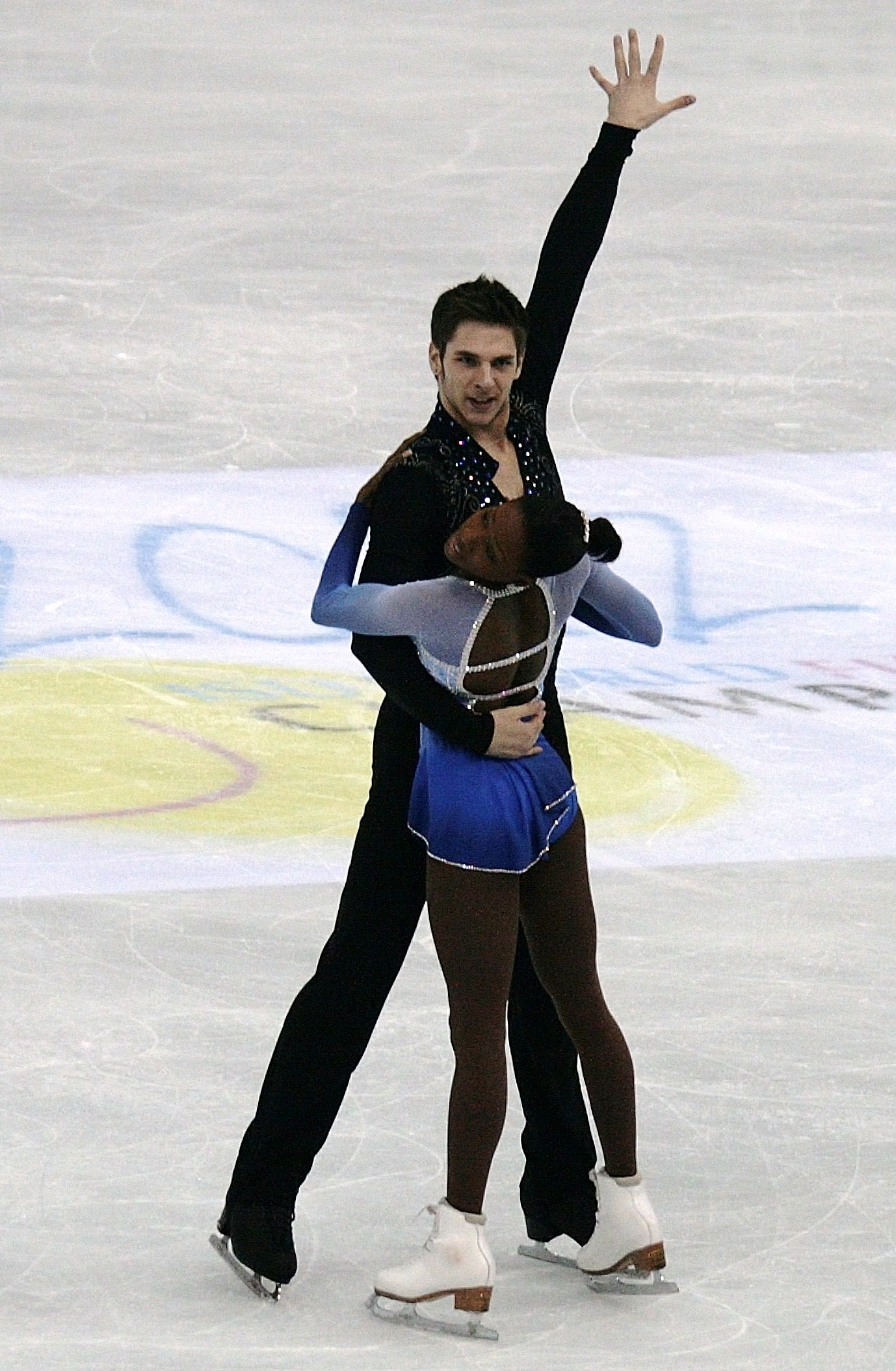 Ванесса Джеймс и Морган Сипре (Франция) на чемпионате мира по фигурному катанию 2012